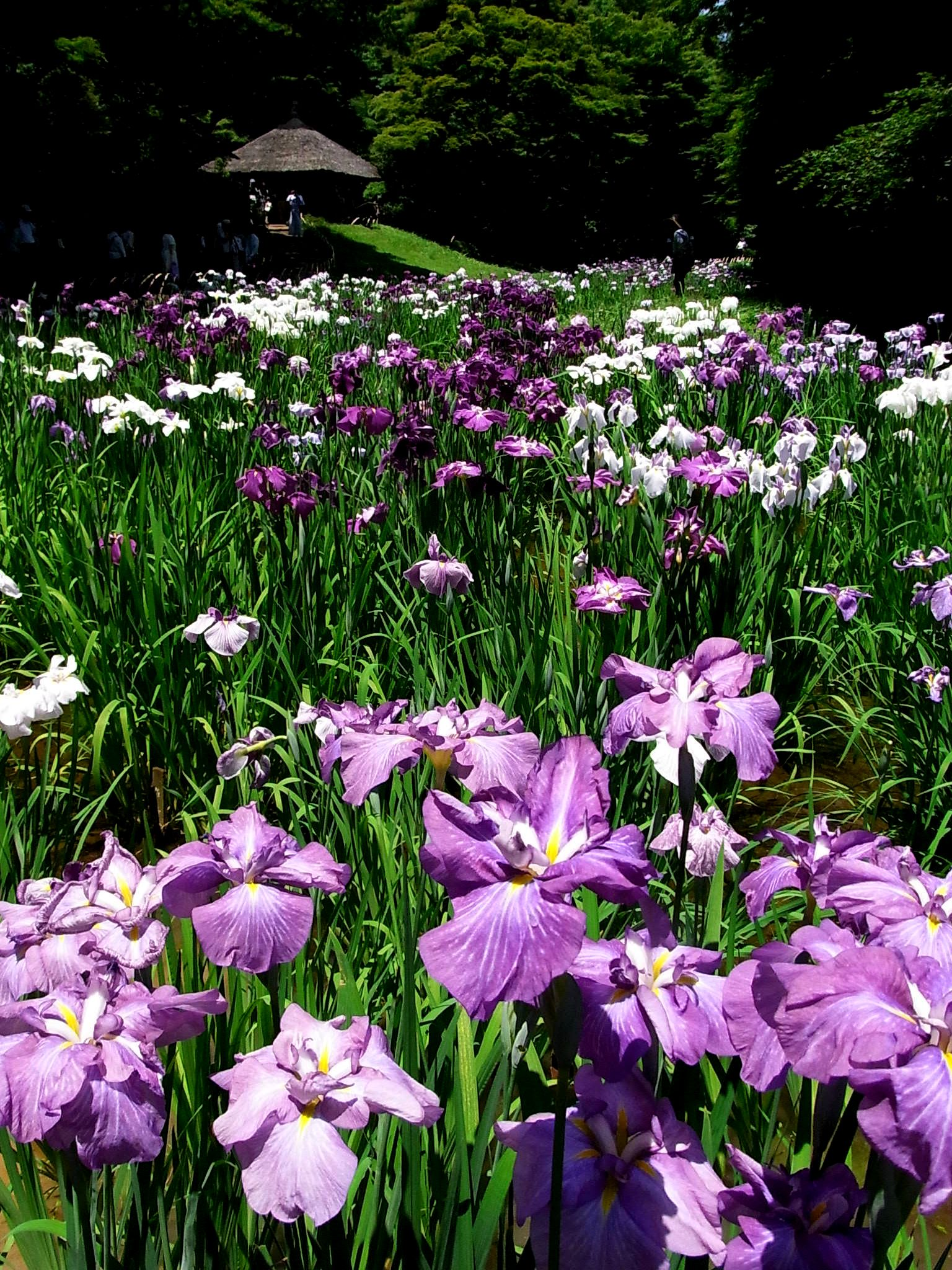 東京都渋谷区代々木神園町、明治神宮御苑の花菖蒲